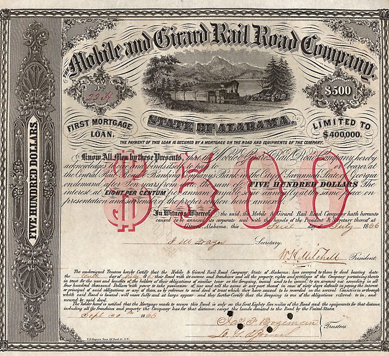 Bond of the Mobile and Girard Rail Road Company from the 1st July 1866